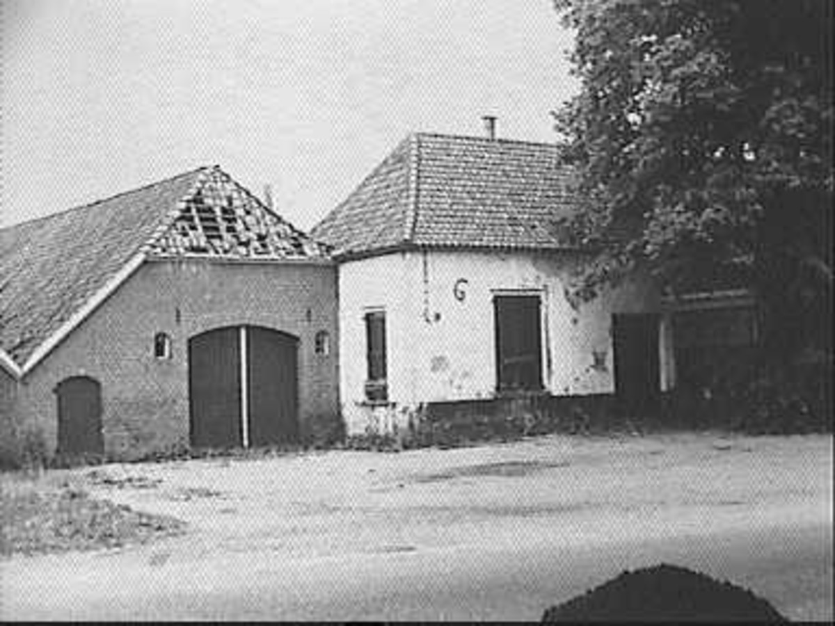 Booltink: voorgevel (opmerking: Deze afbeelding hebben wij helaas alleen in deze lage resolutie.)